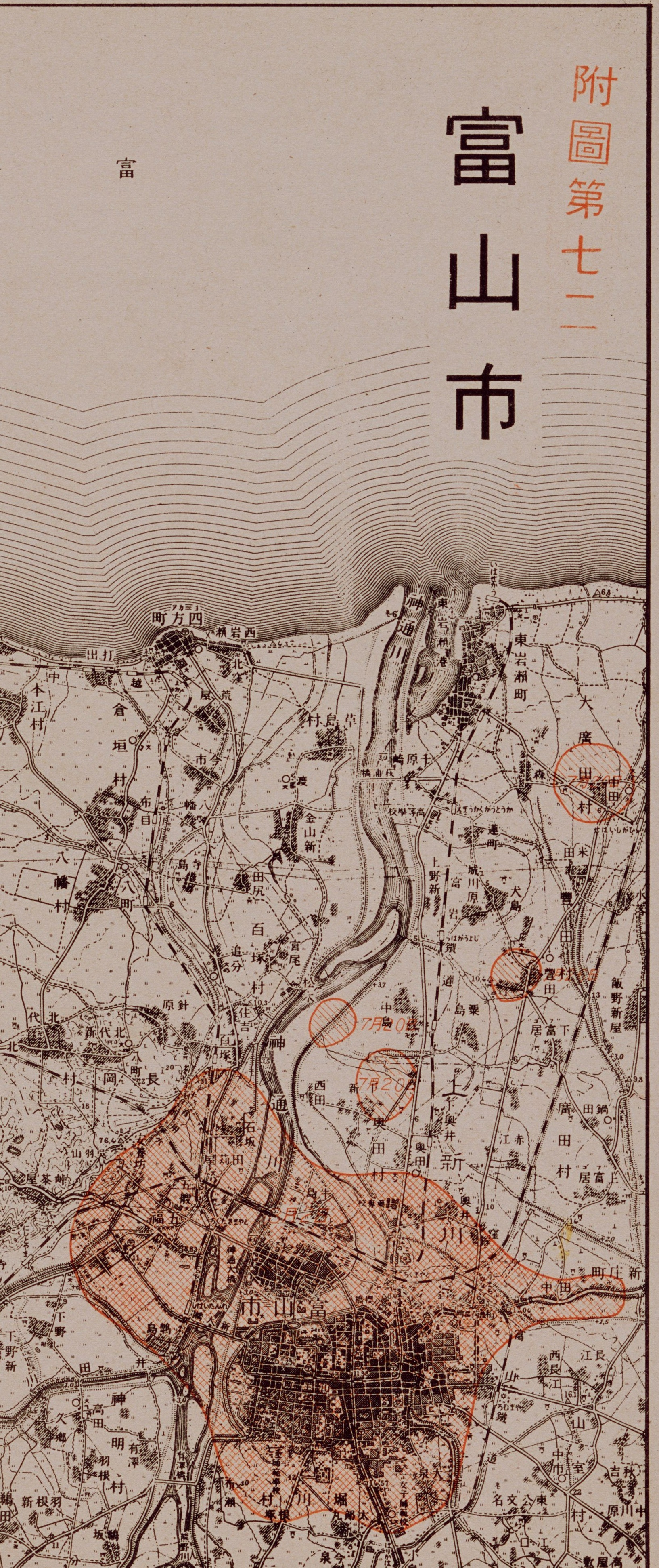 第一復員省資料課作成の富山における全国主要都市戦災概況図